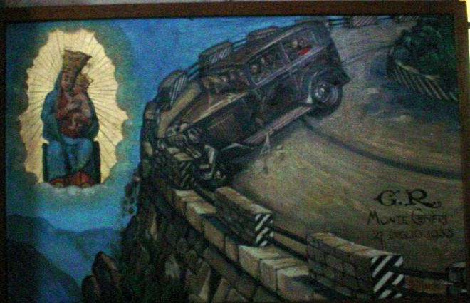 Votivbild mit Maria in der Wallfahrtskirche Maria dell Sasso (Locarno).